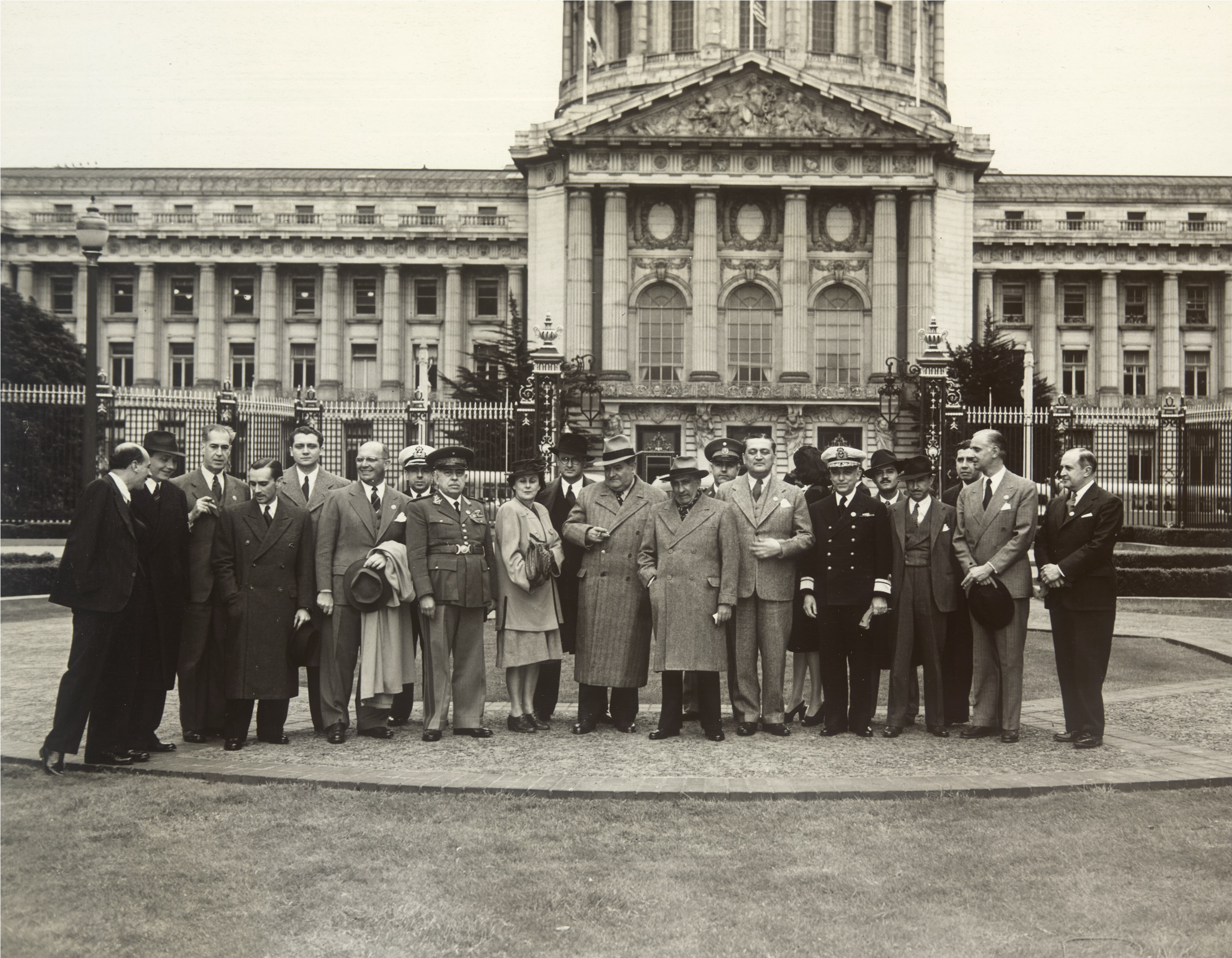 Fotografia de Bertha Lutz e outros membros da delegação do Brasil enviada à Conferência de São Francisco, Estados Unidos, que elaborou a carta da Organização das Nações Unidas – ONU. Fundo: Federação Brasileira pelo Progresso Feminino.